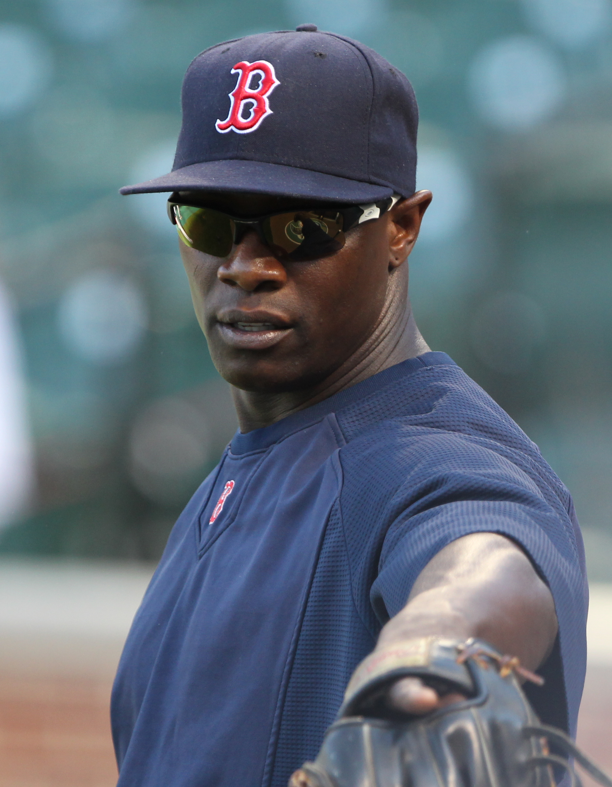 Mike Cameron